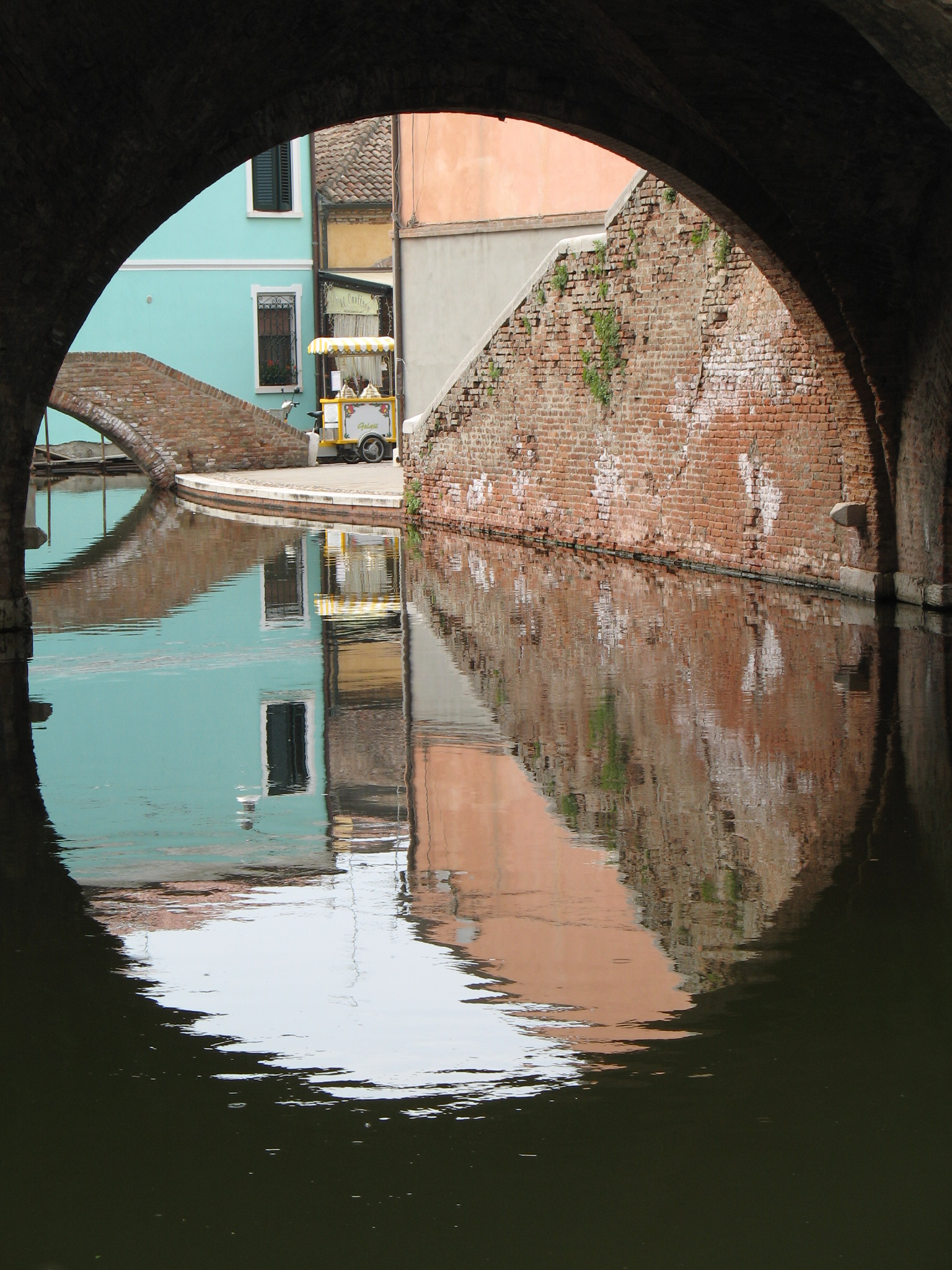 Comacchio, Emilia Romagna, Italia angolo pittoresco